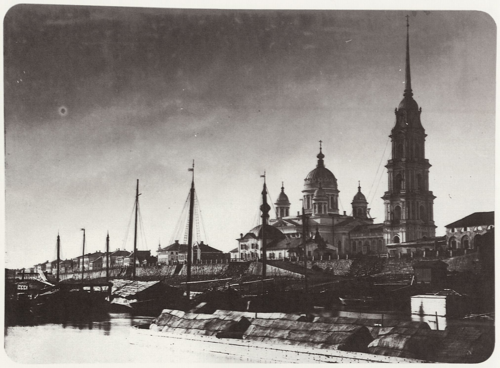 Nastjukov, Michail P.: Der Volgakai in Rybinsk im Gouvernement Jaroslavl